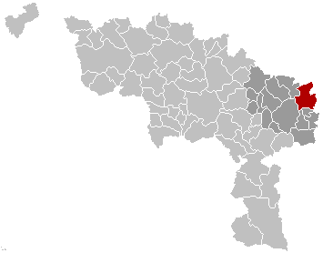 Gemeentekaart, eigen werk